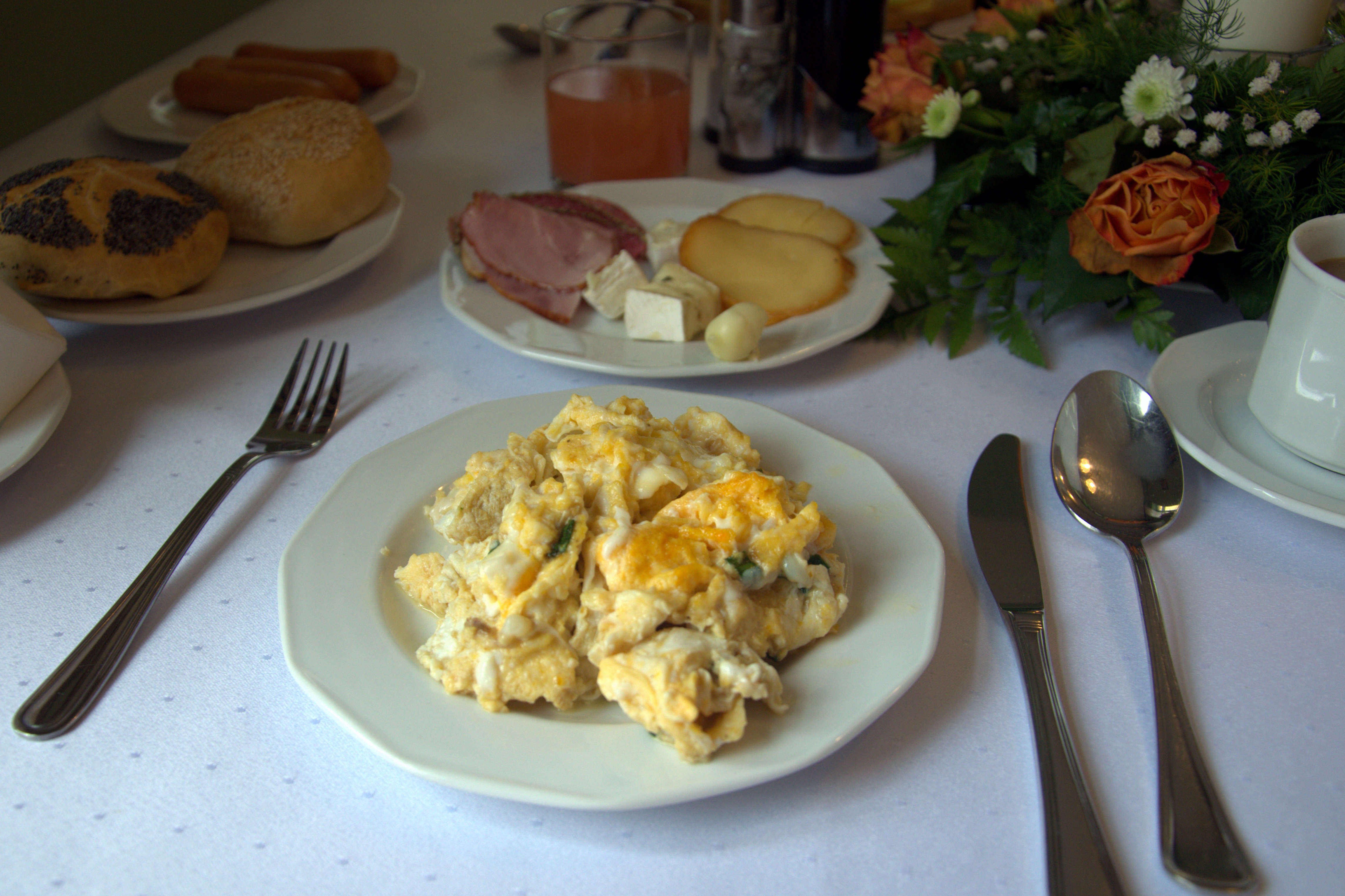 Eier im Schmalz 2015